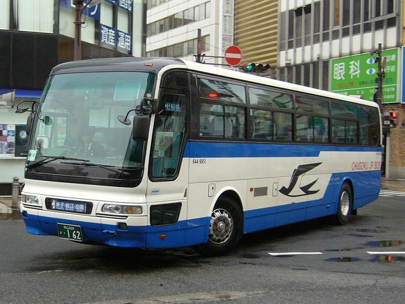 登録番号 岡山200か・686 中国ジェイアールバス(Chugoku JR bus)岡山支店所所属 ももたろうエクスプレス号用 三菱ふそう・エアロバス KL-MS86MP